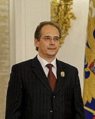 Дмитрий Лисс